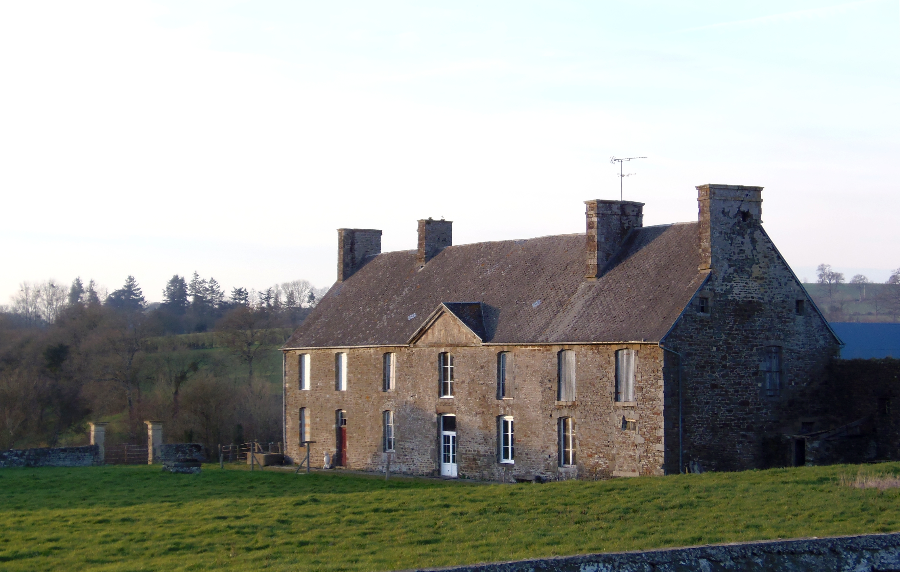 Saint-Pierre-Tarentaine (Normandie, France). L'ancien manoir de Crennes.